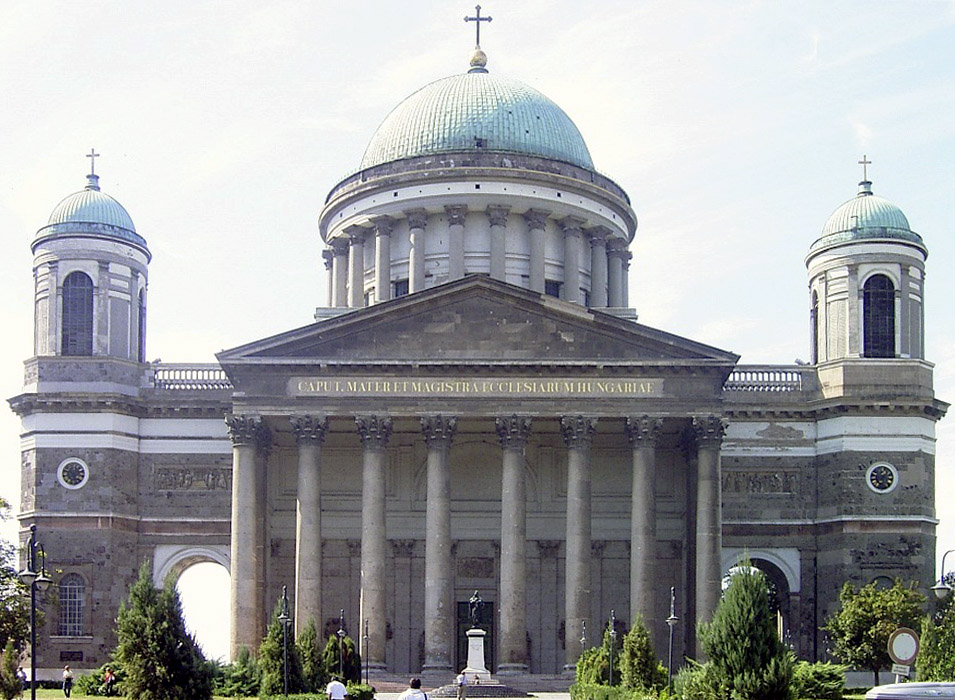 Basilika in Esztergom 2004